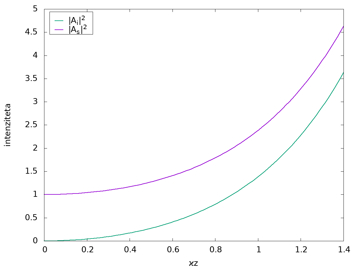 Intenziteta žarkov med prehodom skozi optični kristal, če upoštevamo ujemanje faz.